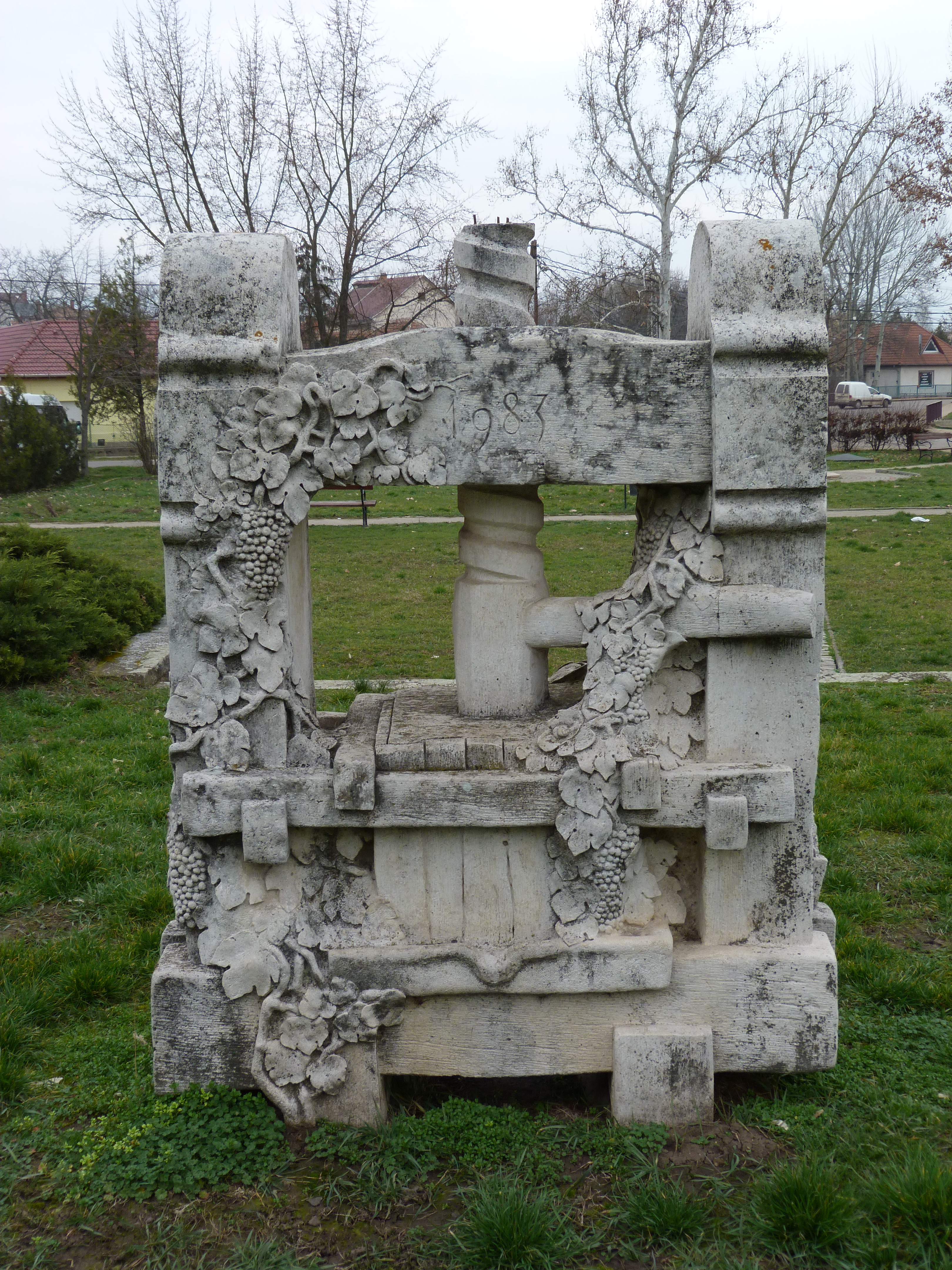 Szőlőprés (Szentirmai Zoltán, 1983). - Magyarország, Heves megye, Nagyréde, Erzsébet tér, a Coop áruház melletti téren.